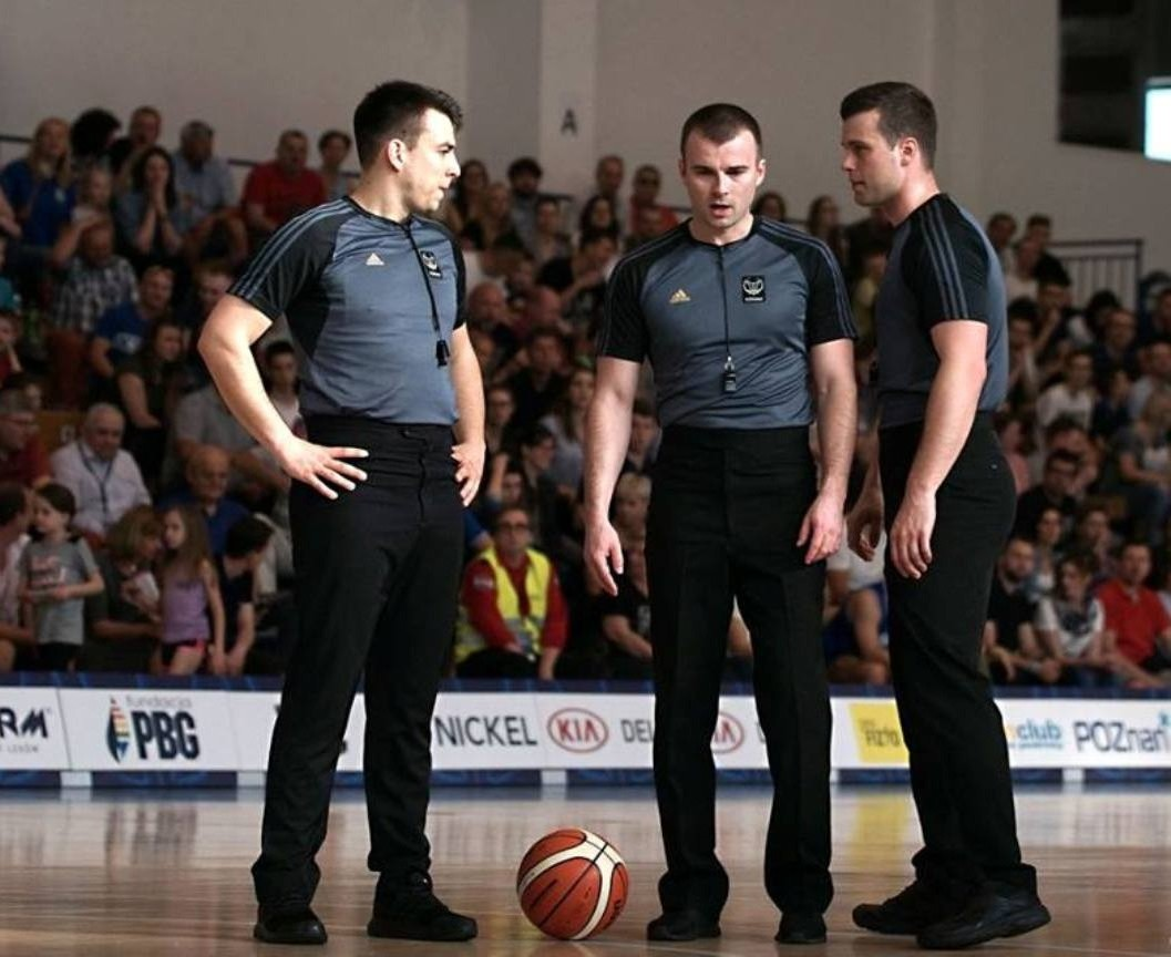 Sędziowie meczu Biofarm Basket Poznań - Spójnia Stargard